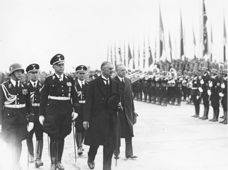 Zentralbild 30.9.1938 Zum Viermächte-Abkommen in München am 29.9.1938 Nach der Unterzeichnung des Abkommens schreitet der britische Ministerpräsident Sir Neville Chamberlain vor seinem Abflug am 30.9. vom Flughafen Oberwiesenfeld die Front der Ehrenkompanie der SS Standarte "Deutschland" ab. Rechts: Reichsaussenminister v. Ribbentrop, links der Polizeipräsident von München, Freiherr von Eberstein. 12911-38 [Scherl Bilderdienst]